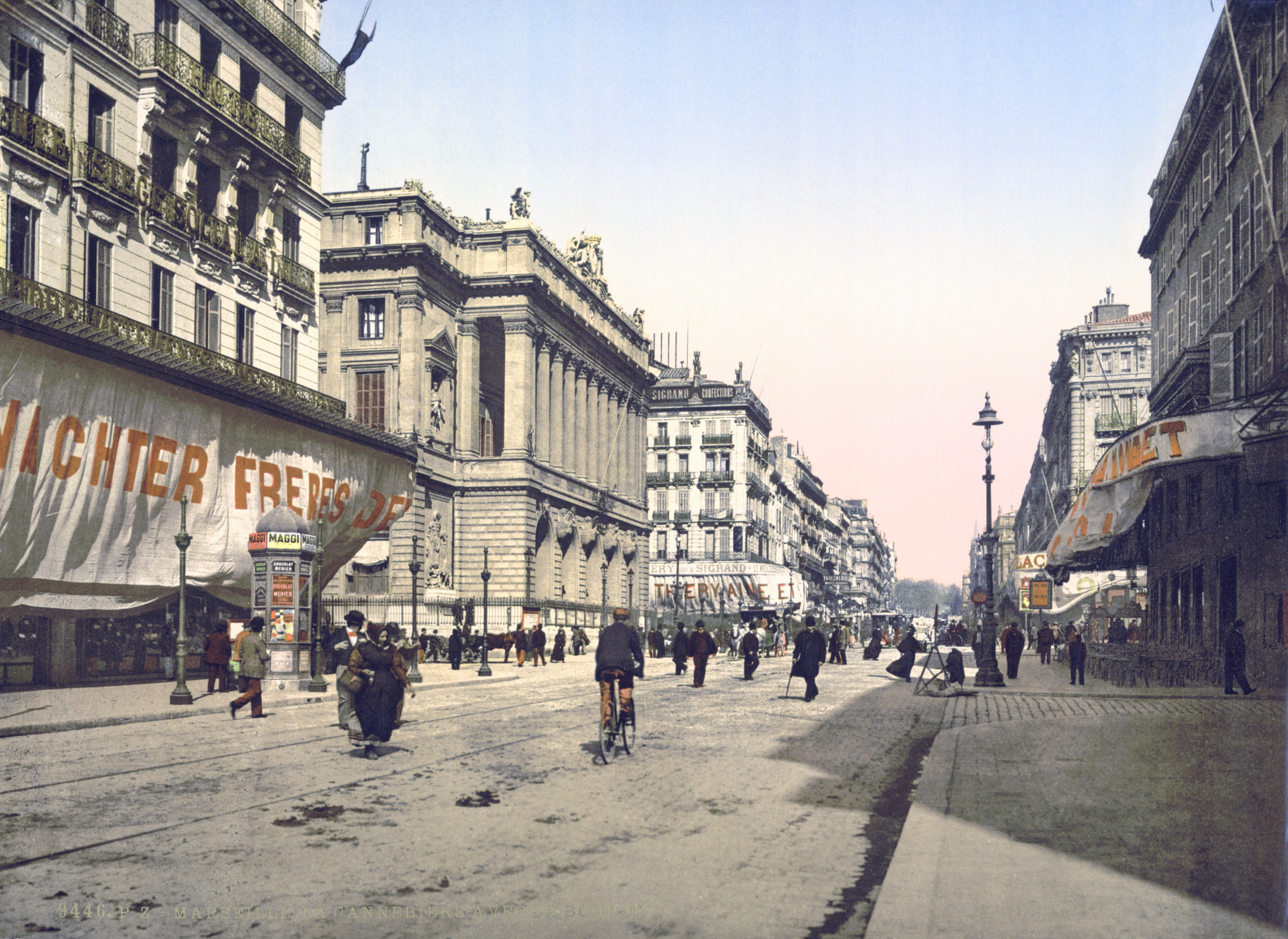 Canebière et palais de la Bourse à Marseille vers 1890-1900